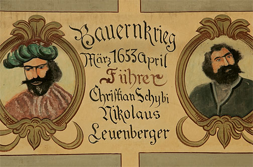 Wandgemälde zum Bauernkrieg beim Obertor in Willisau